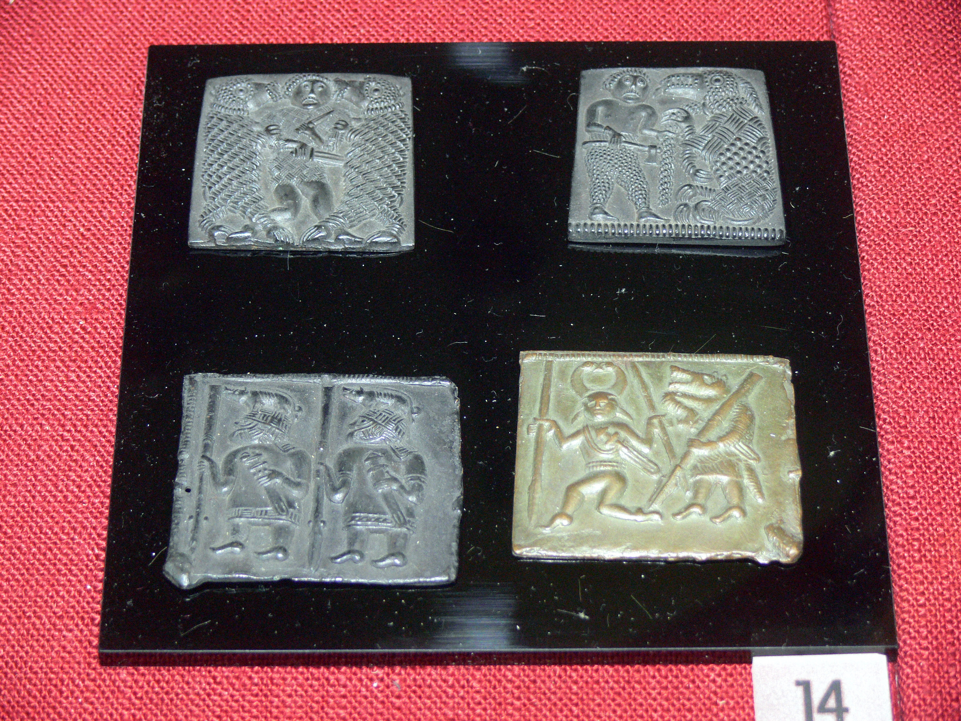 Vier Model aus Björnhovda im Kirchspiel Torslunda auf Öland (Schweden). 2. Hälfte des 6. Jh. Replik im Römisch-Germanischen Museum in Mainz. (Original im Staatlichen Historischen Museum Stockholm).